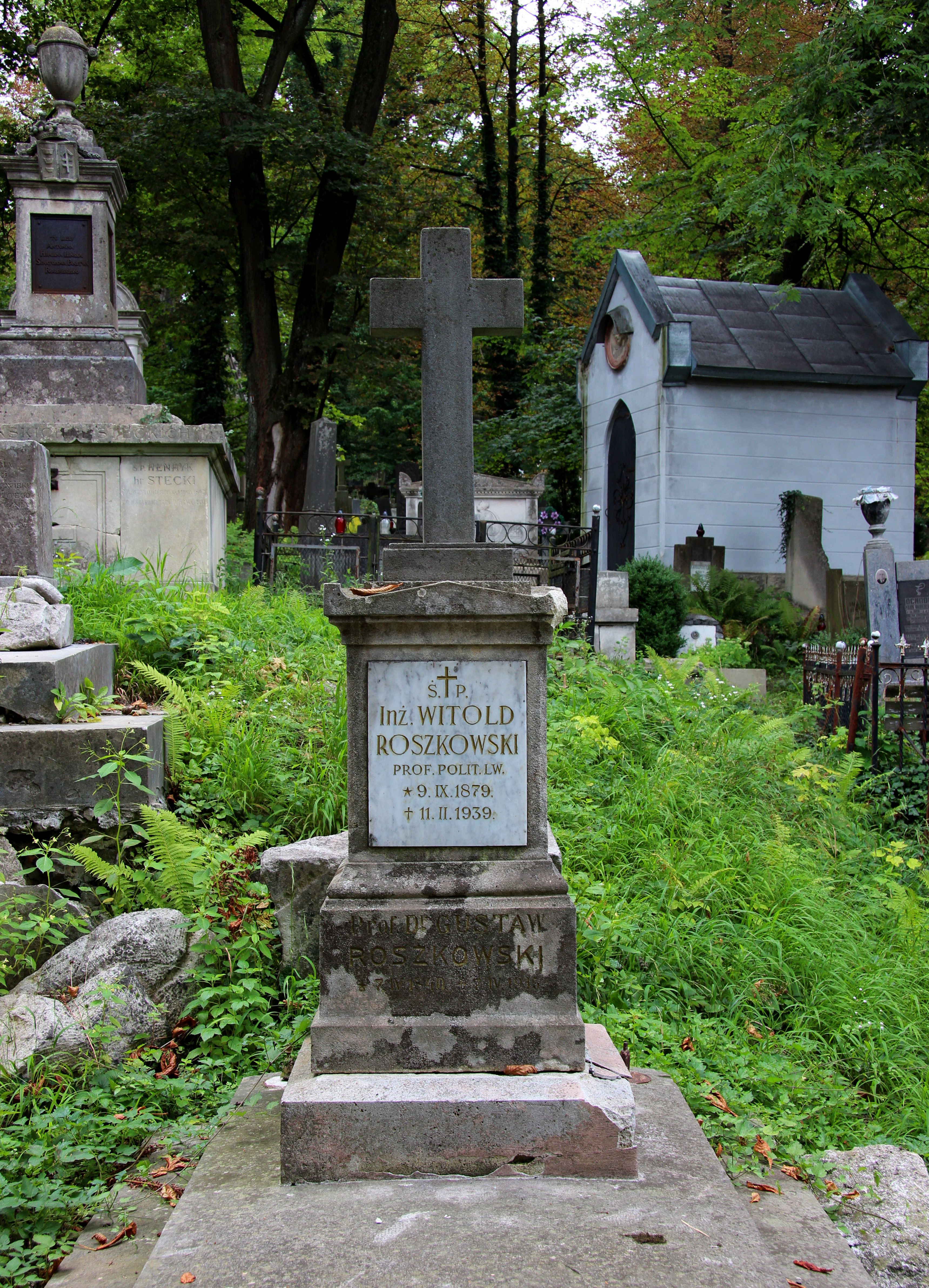 Надгробок на могилі В. Рошковського.Личаківський цвинтар , поле № 5.